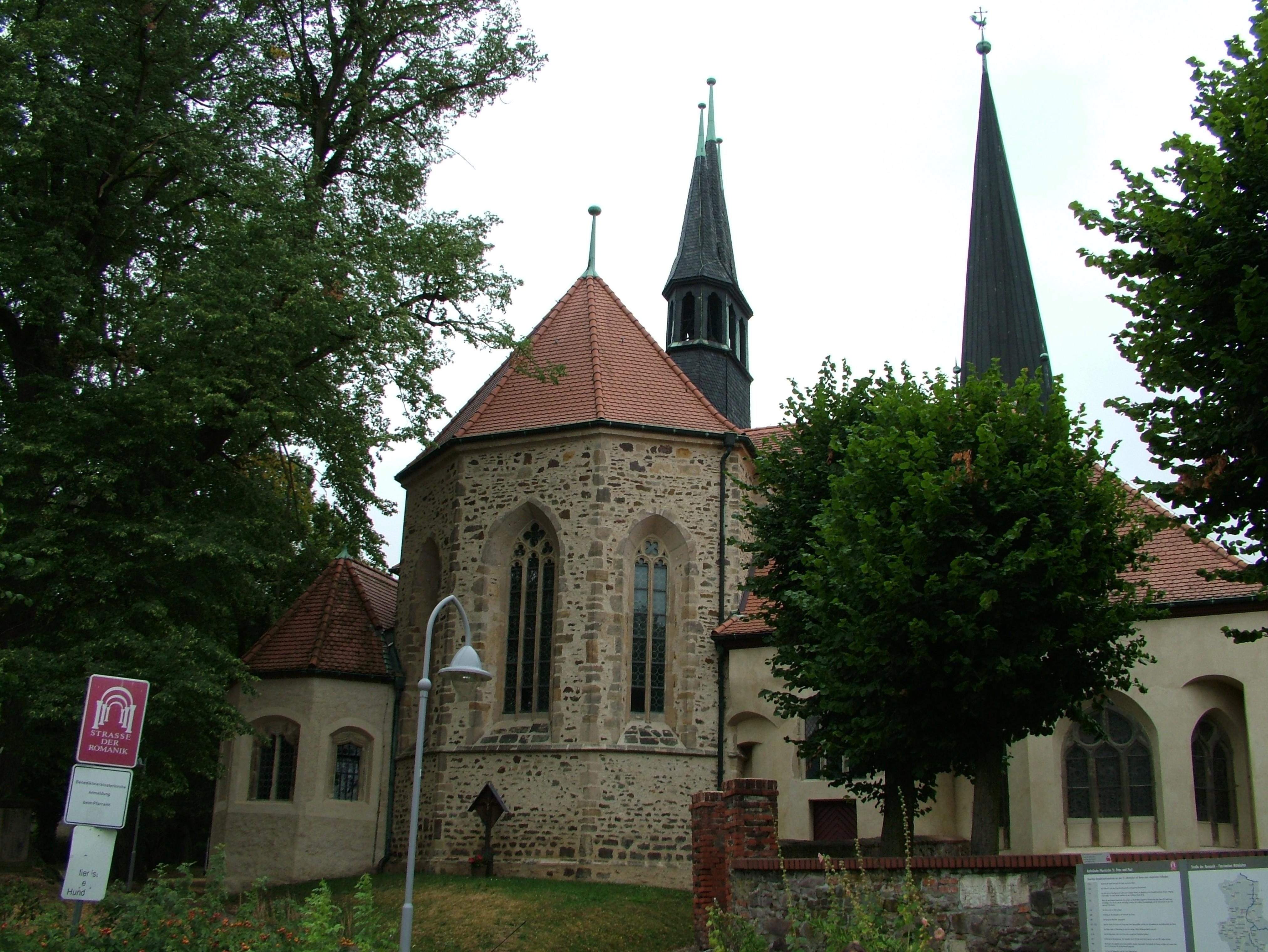 Groß Ammensleben in der Gemeinde Niedere Börde, Sachsen-Anhalt, Deutschland, das Benediktinerkloster